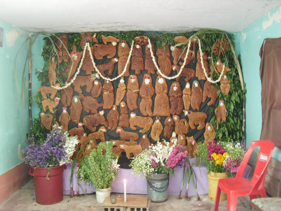 Tanta Wawa con cebolla y caña de azucar